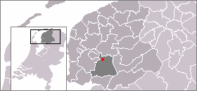 Locatie van Akmarijp, zelf gemaakt uit sjabloon van Wikipedia-gebruiker Mtcv